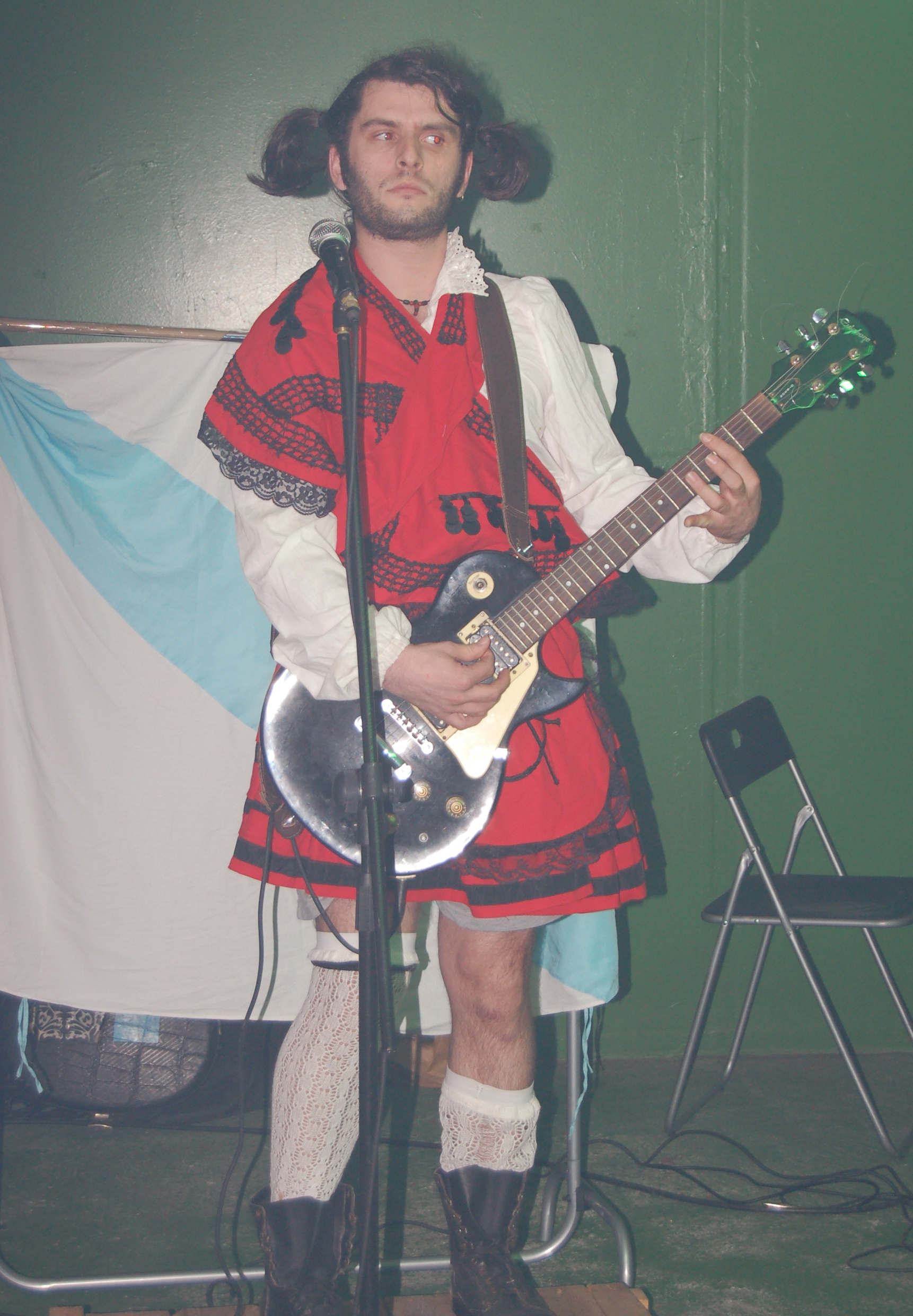 O Leo i Arremecághona! na Gentalha do Pichel